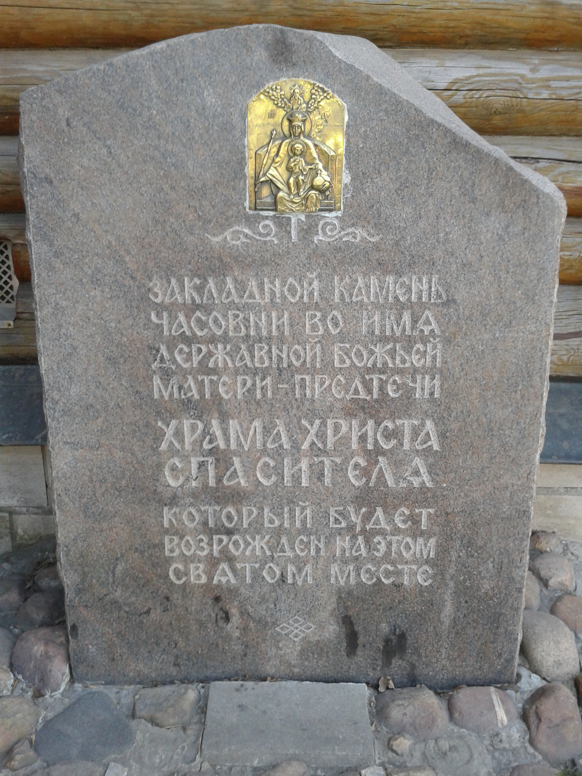 Закладной камень у храма Державной иконы Божией Матери, Москва. Комплекс Храма Христа Спасителя